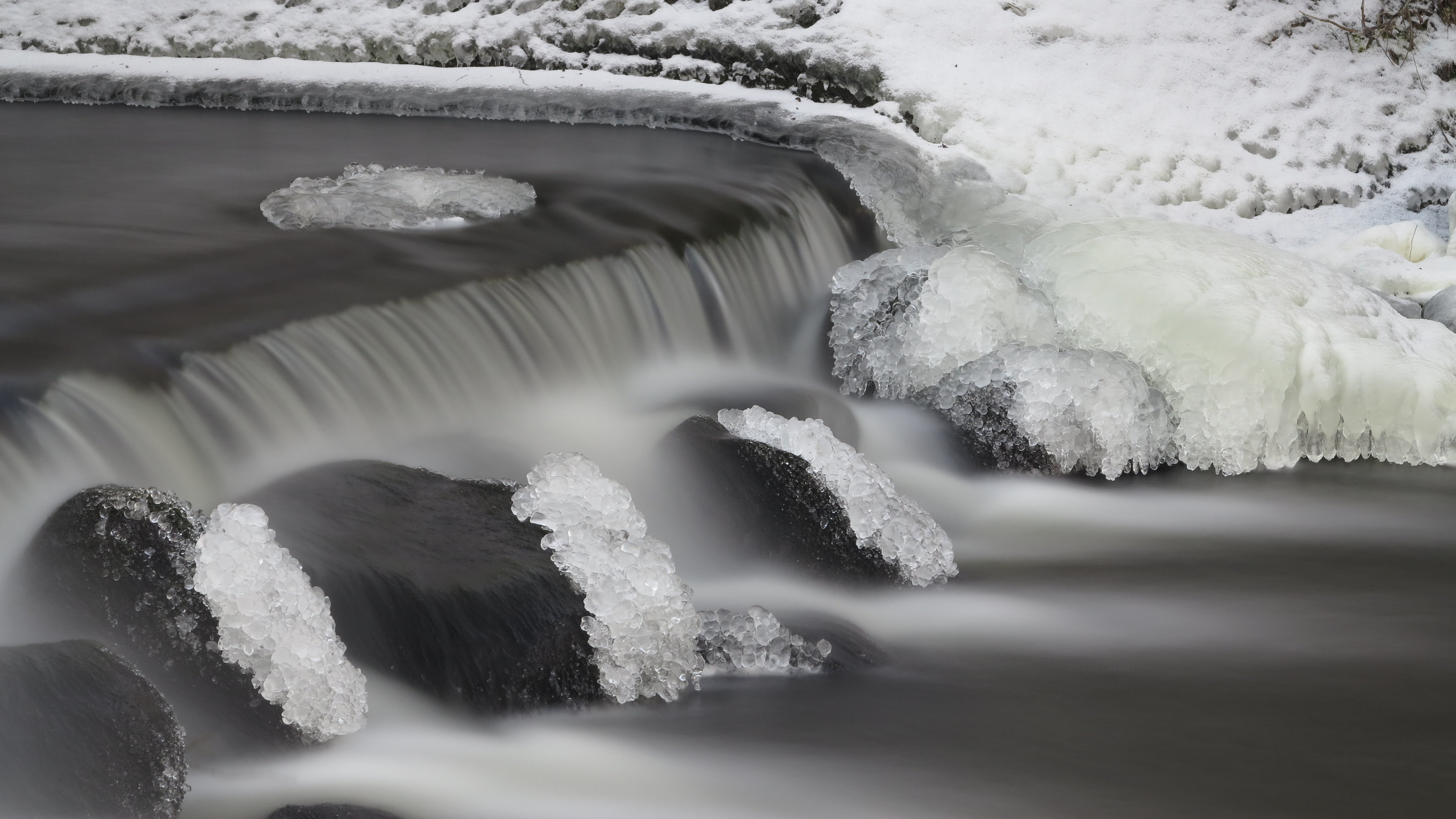 Hellenurme vesiveski veed talvel 2018. aastal